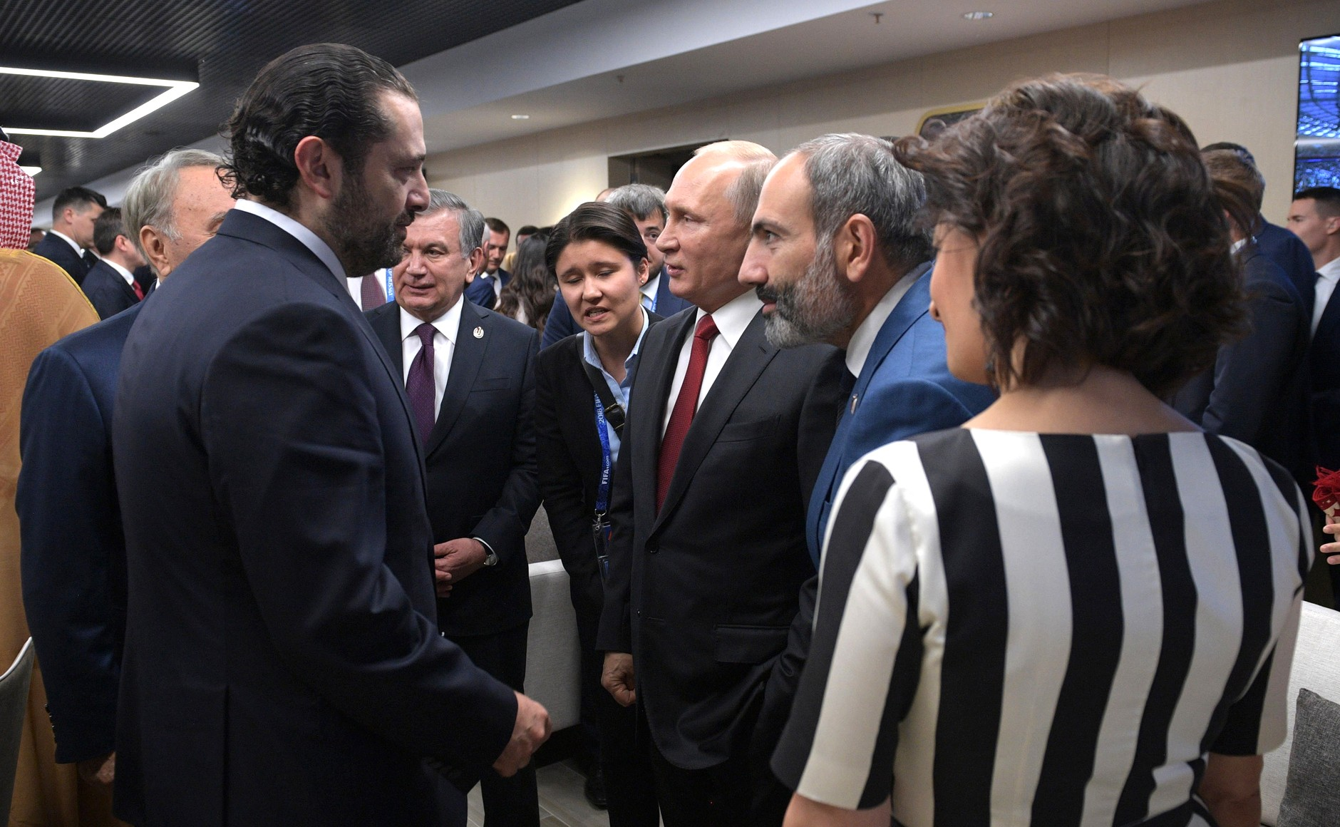 В перерыве матча Президент России Владимир Путин кратко пообщался с иностранными гостями, прибывшими на Чемпионат мира по футболу 2018 года